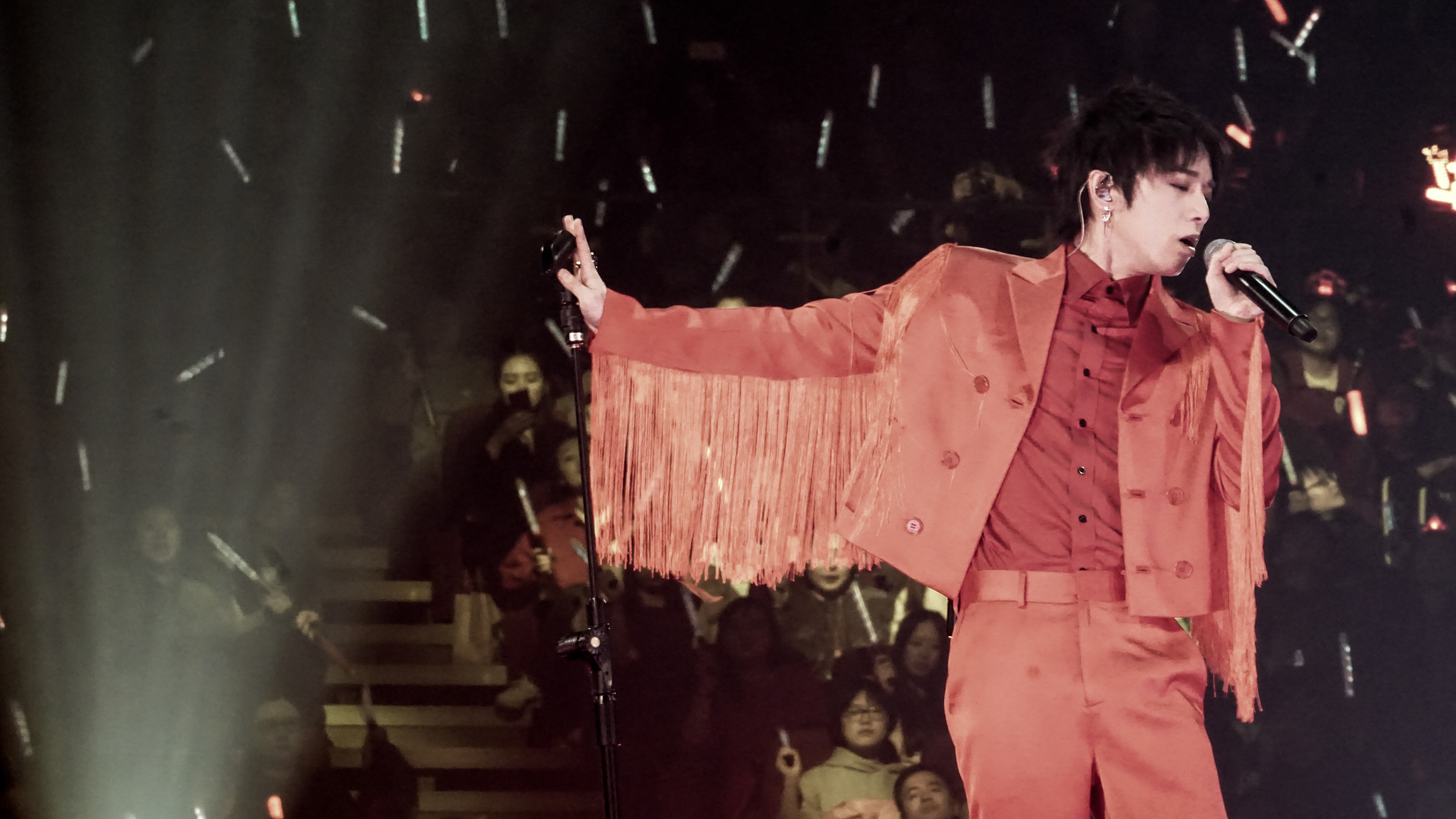 华晨宇 2017火星 演唱会